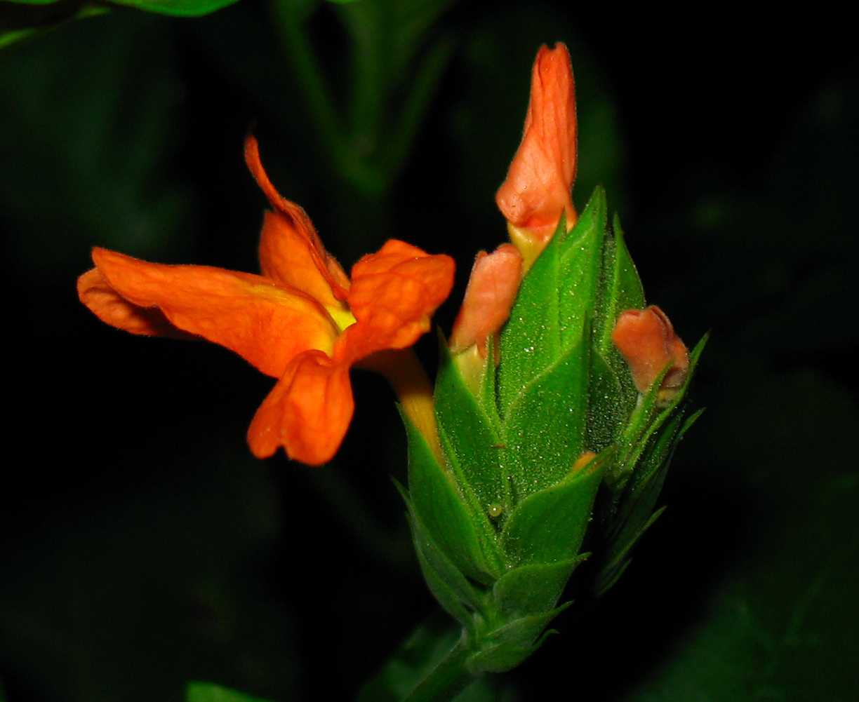 കനകാംബരപ്പൂവ് ഒരു രാത്രി ദൃശ്യം